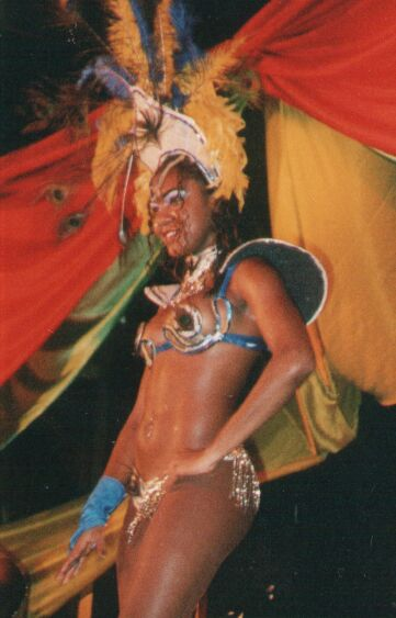 Karneval